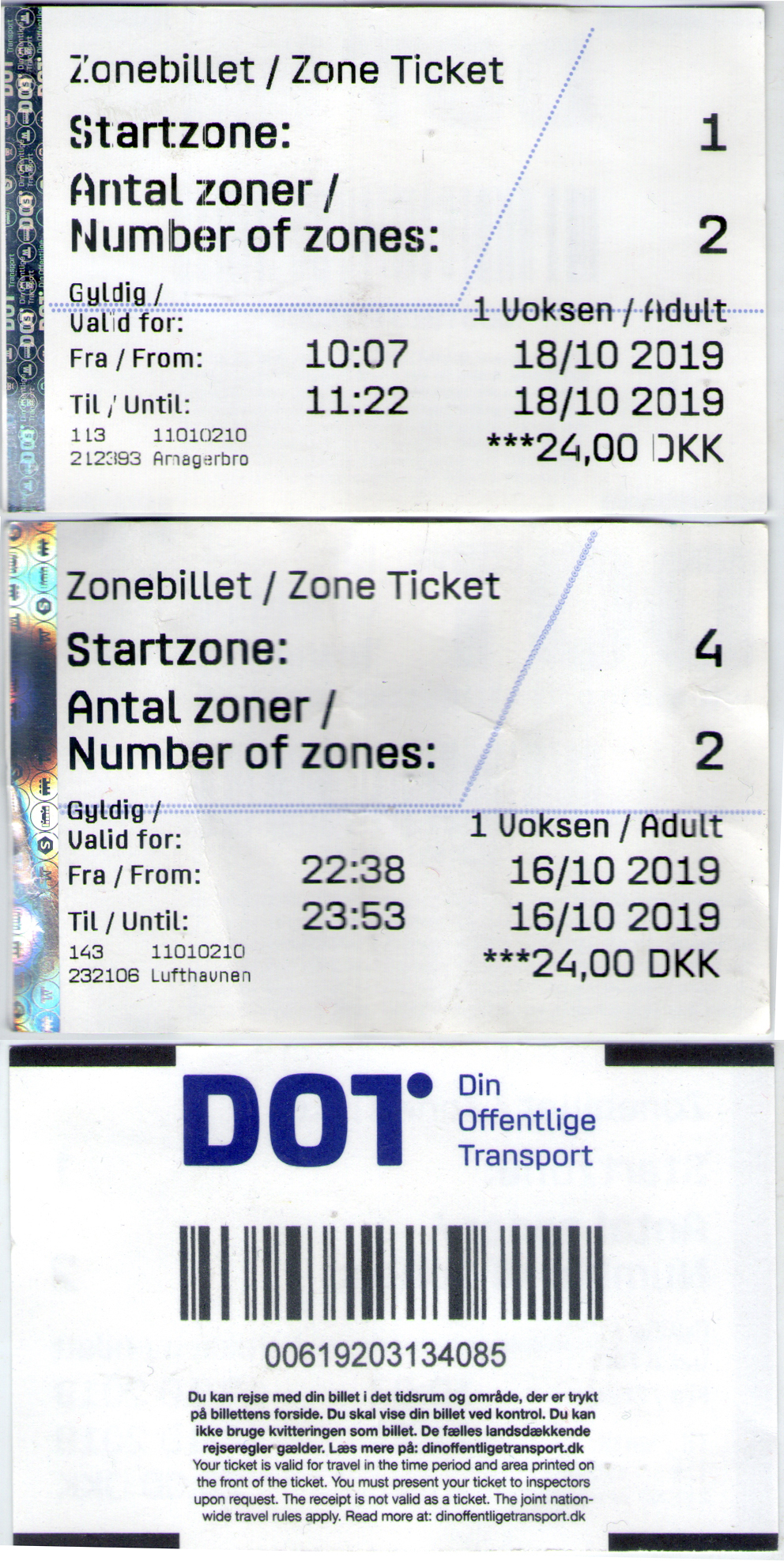 два аверса и один реверс билета на копенгагенское метро